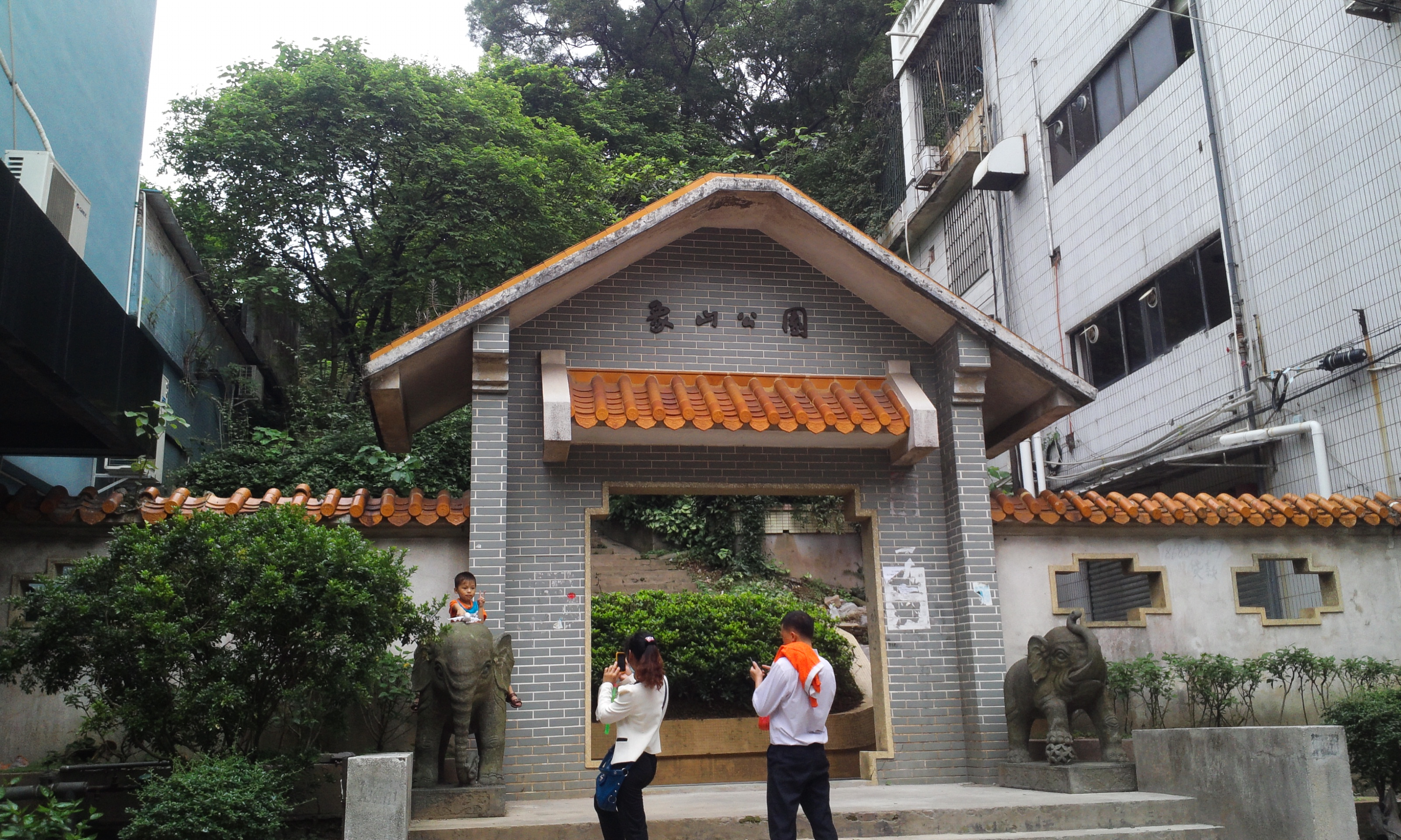 象山公園，位於中國廣東省江門市新會區